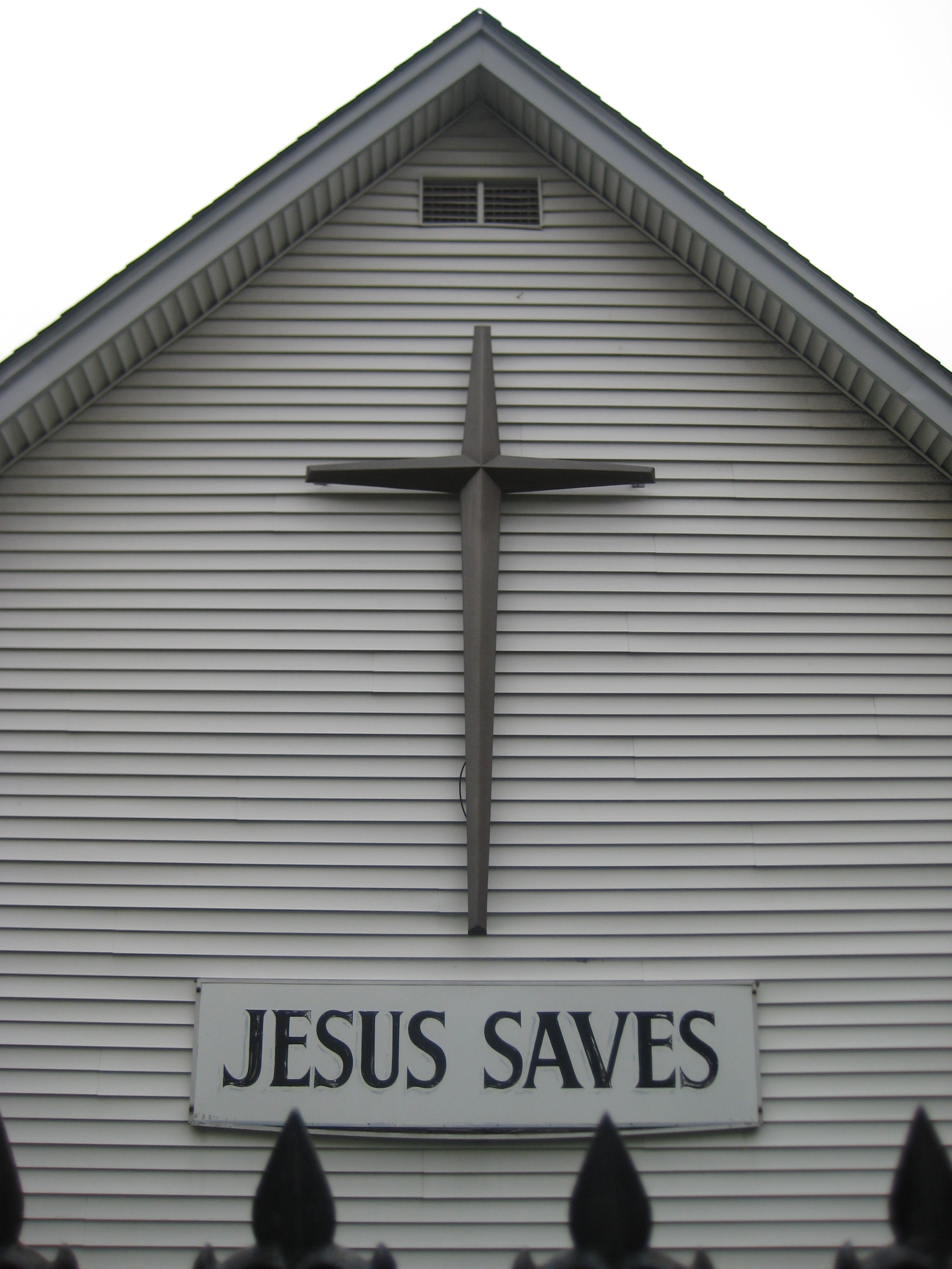 Jesus Saves